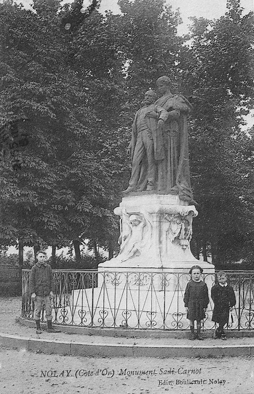 Monument à Sadi-Carnot, bronze, sculpteur : Alexandre Falguière. Inauguré le 8 septembre 1895 à Nolay (Côte-d'Or). Détruit après 1941. Carte postale éditeur Boulicault, Nolay. Photographe inconnu.